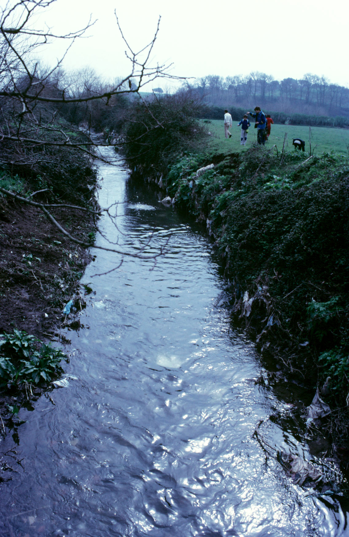 Fiume Almone alla Caffarella